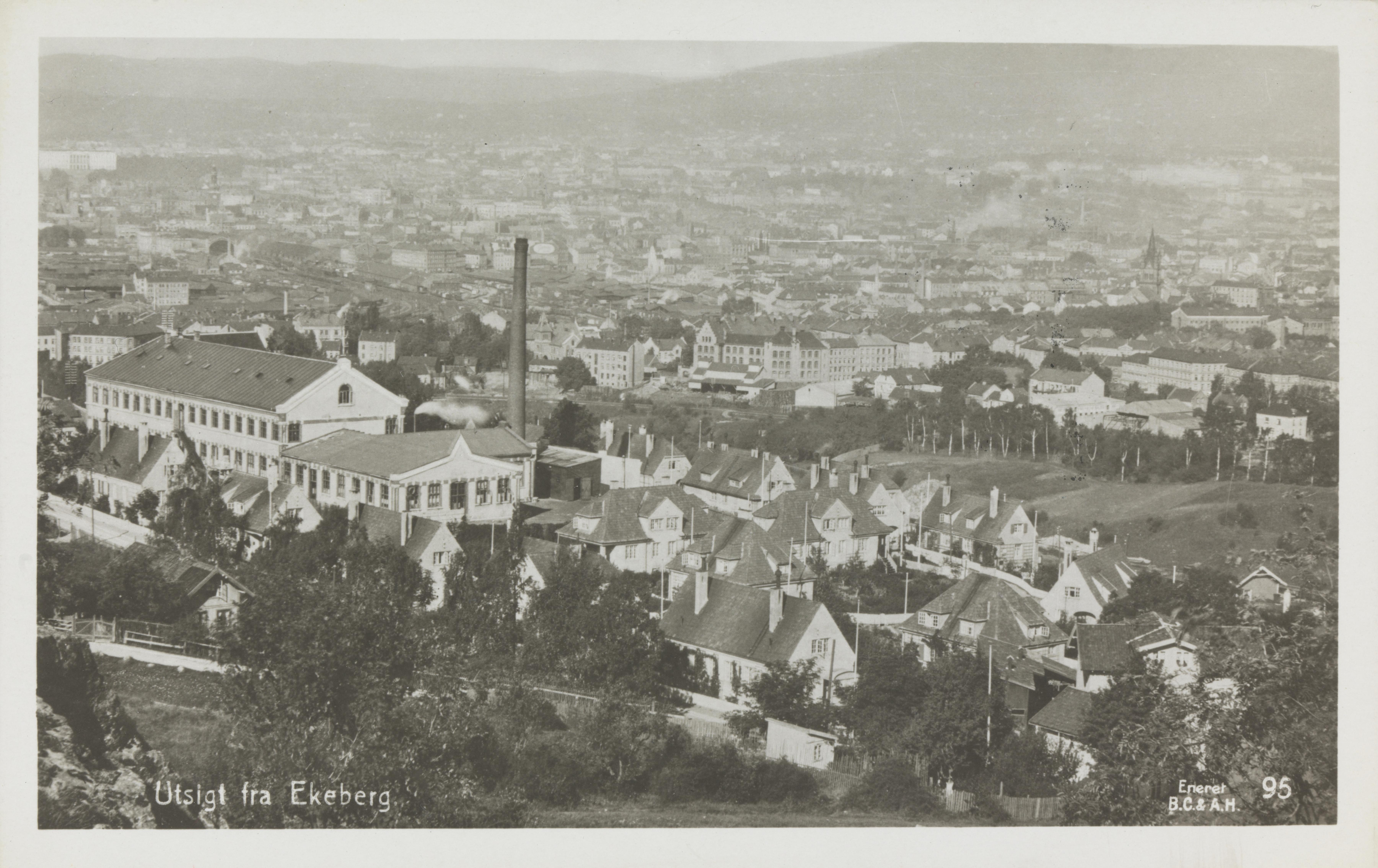 Bildet er hentet fra Nasjonalbibliotekets bildesamling Kværnerbyen, Oslo, Oslo